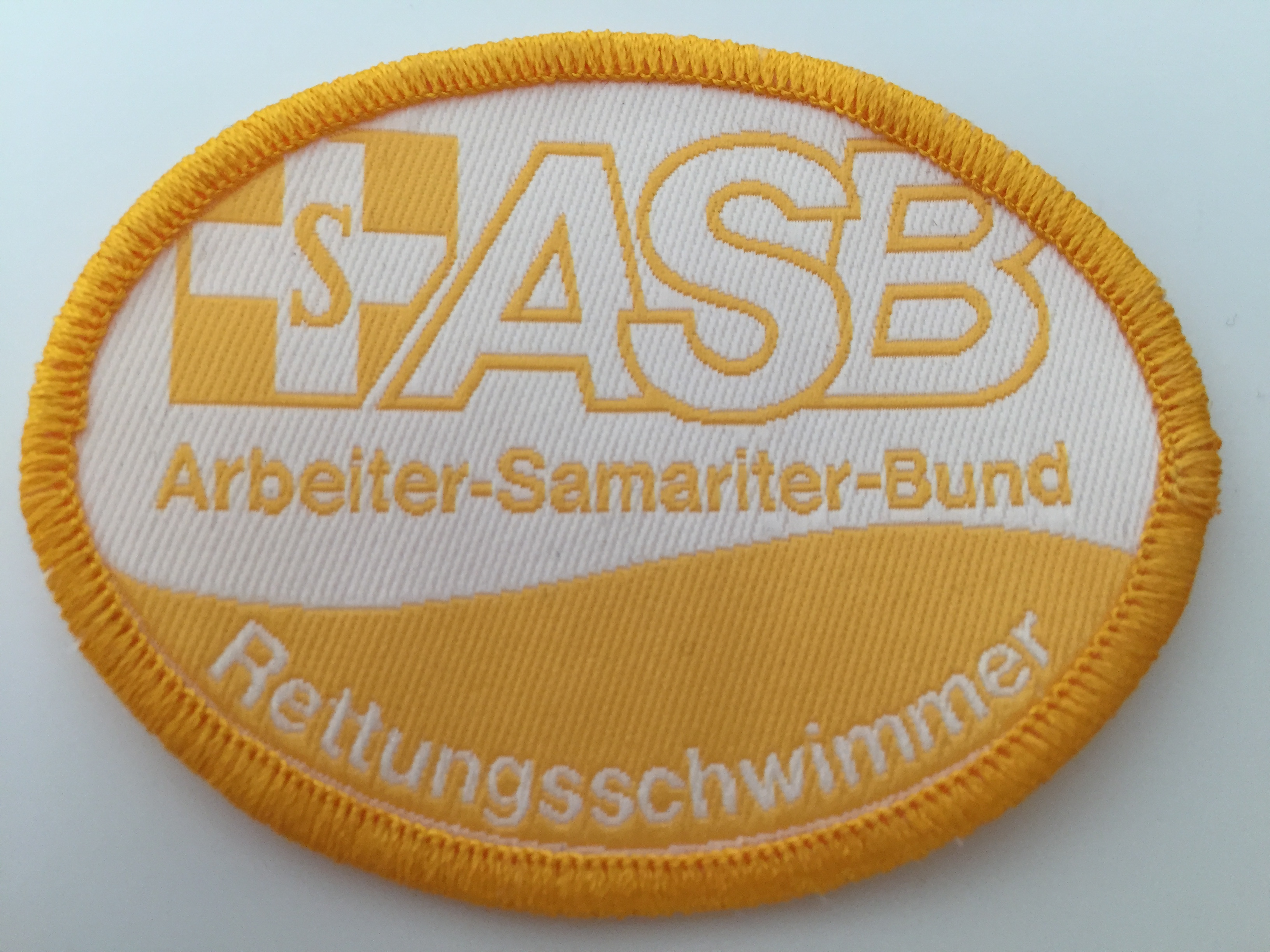 Deutsches Rettungsschwimmabzeichen in Gold des Wasserrettungsdienstes des Arbeiter-Samariter-Bundes